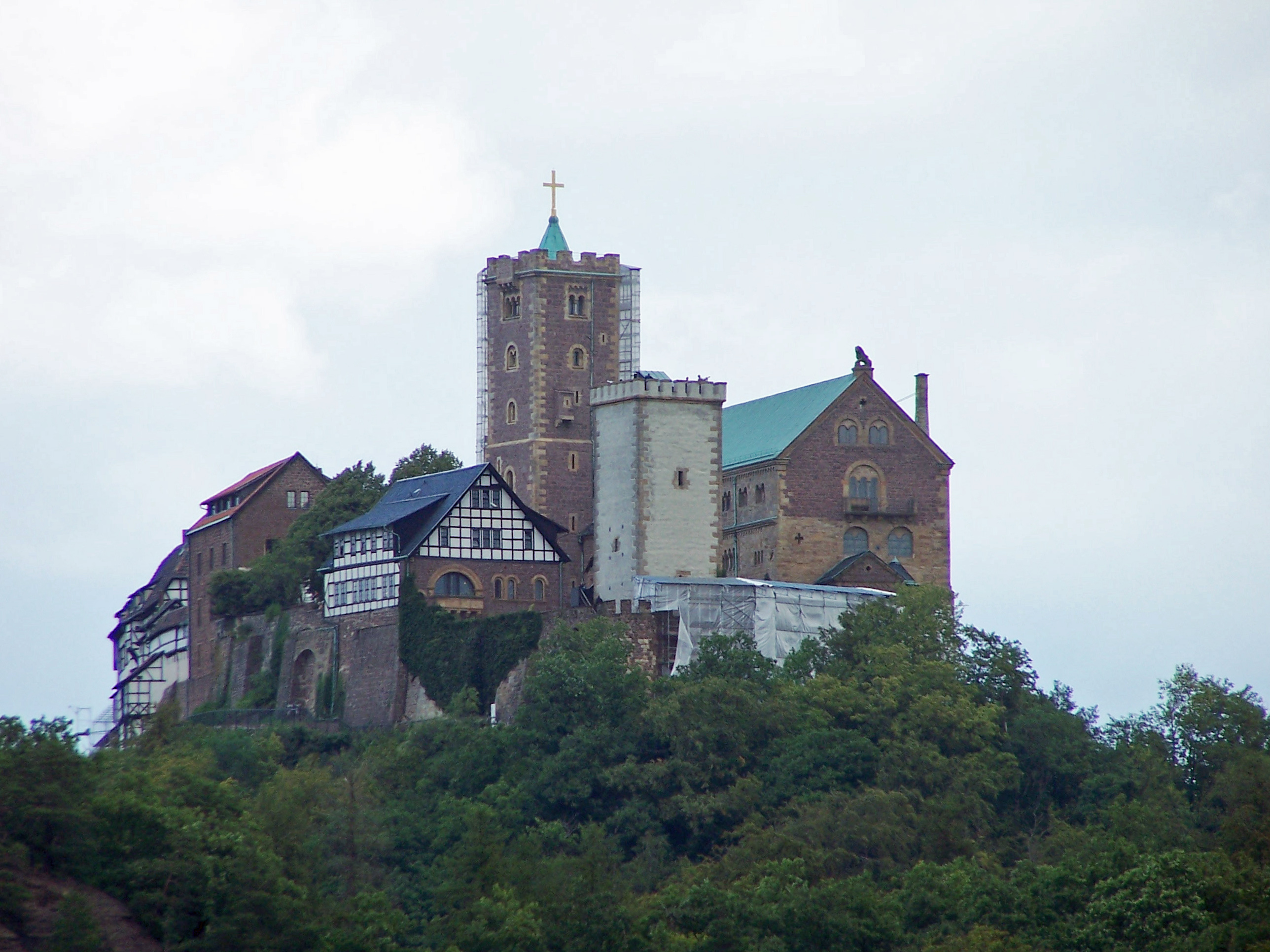 Ansicht der etwa 1000 m entfernten Burg vom Katzensprung aus südlicher Richtung.